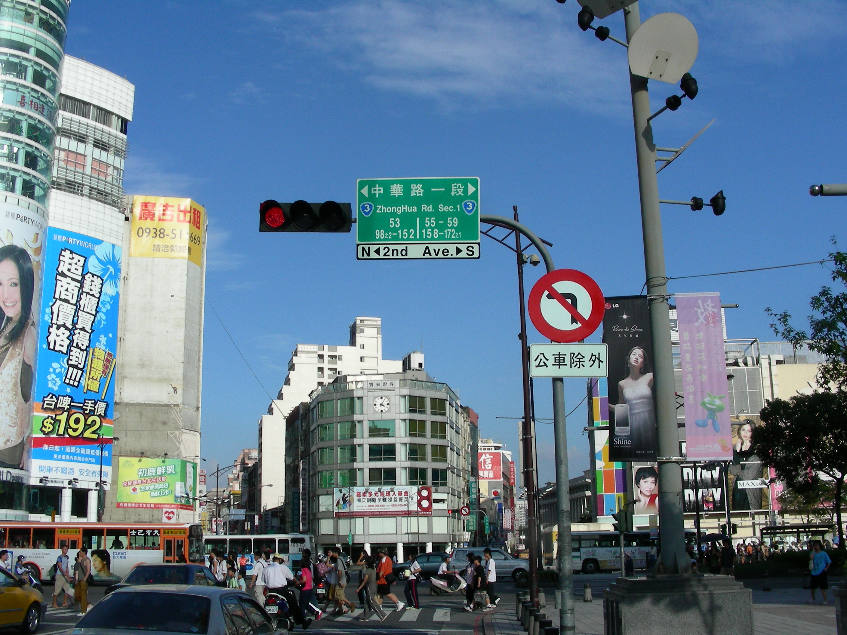 台3線台北市西門町段，台北市中華路一段。